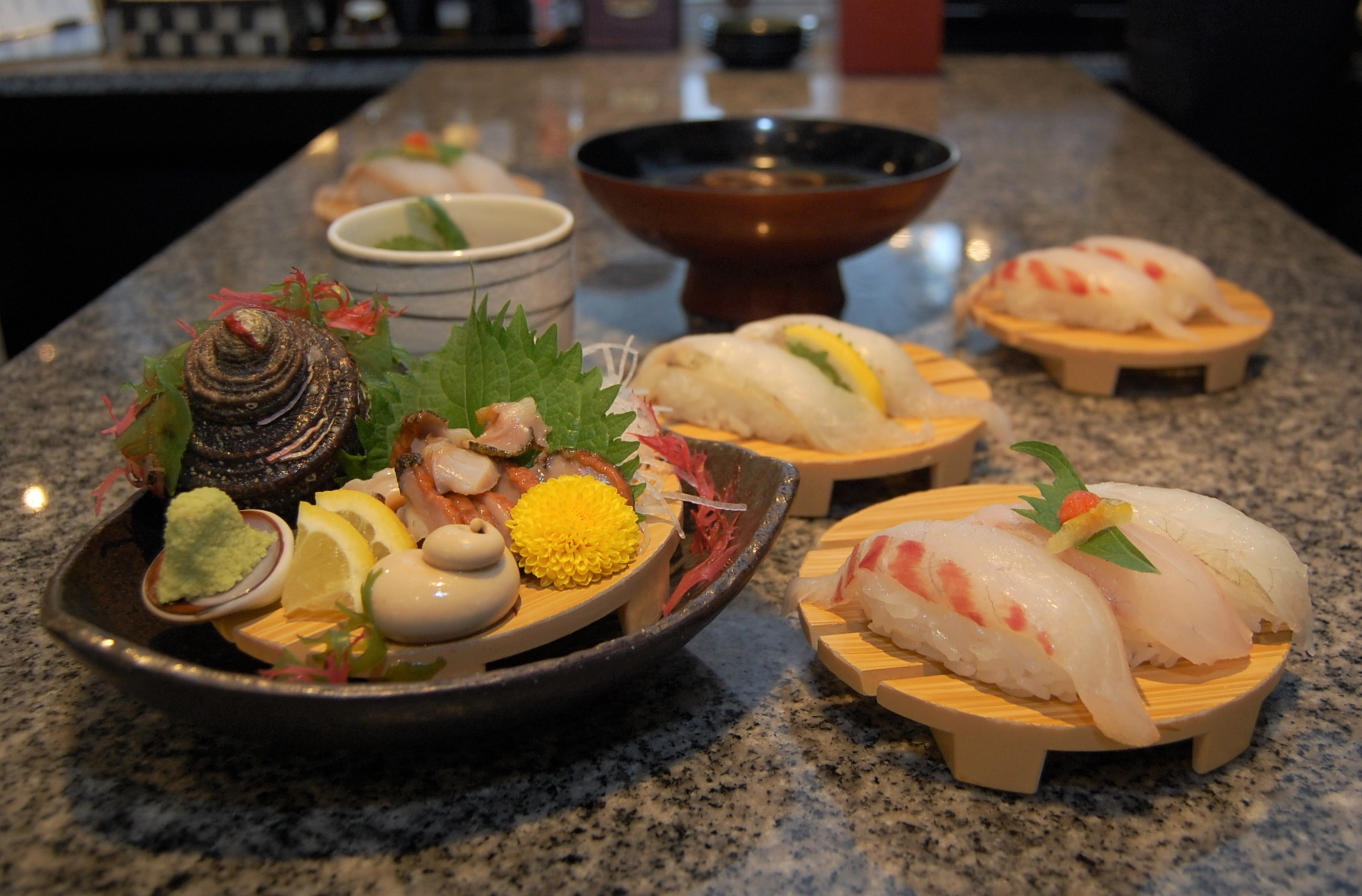 Kansaifoods Co., Ltd.「力丸」